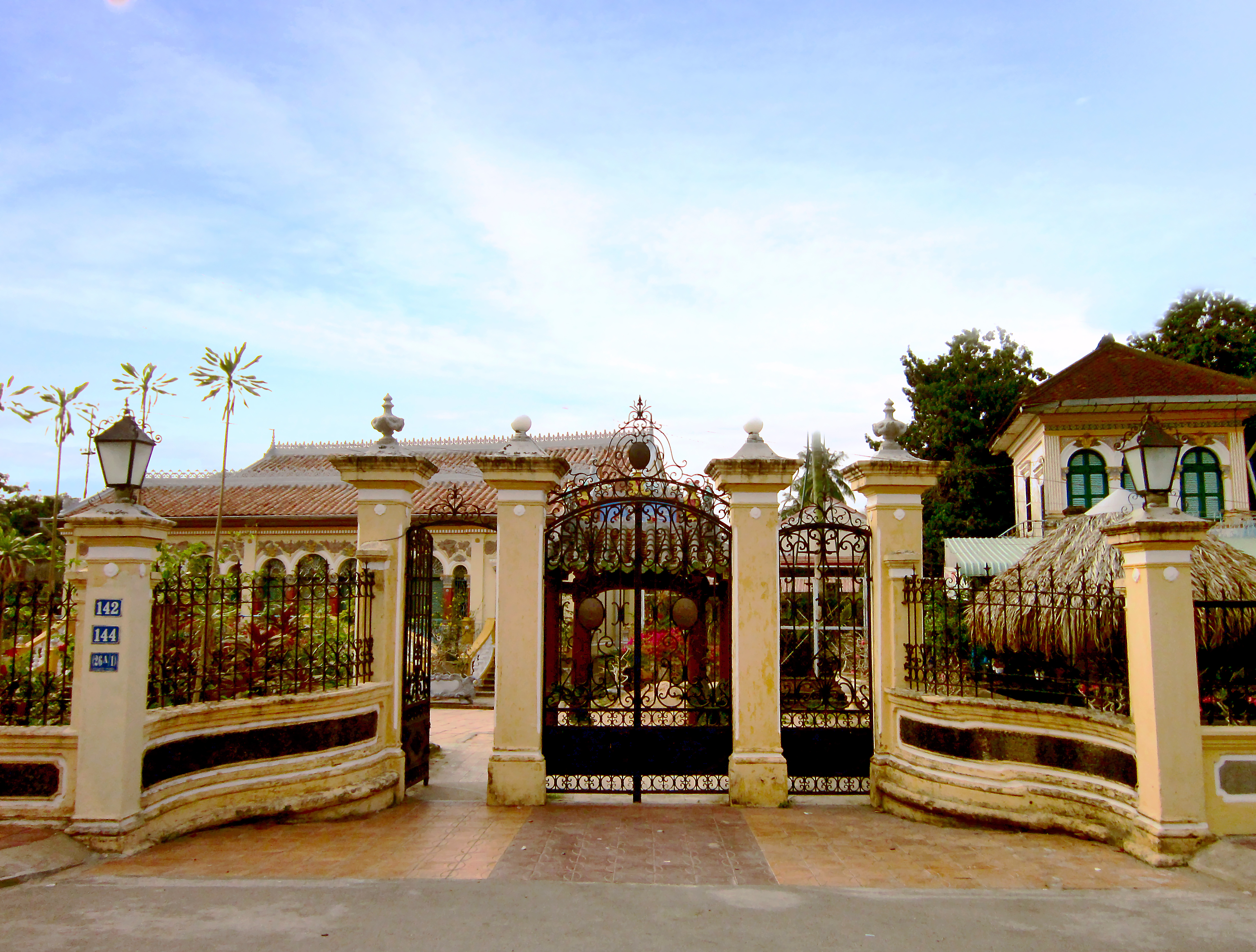 Nhà thờ họ Dương (còn gọi là Nhà cổ Bình Thủy hay Vườn lan Bình Thủy) ở số 142 và 144 đường Bùi Hữu Nghĩa, thuộc phường Bình Thủy, thành phố Cần Thơ, Việt Nam. Đây là một ngôi nhà cổ tiêu biểu và nổi tiếng ở miền Nam Việt Nam.